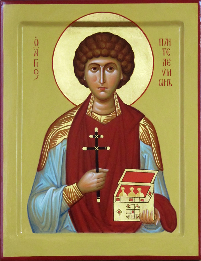 Вмч.Пантелеимон